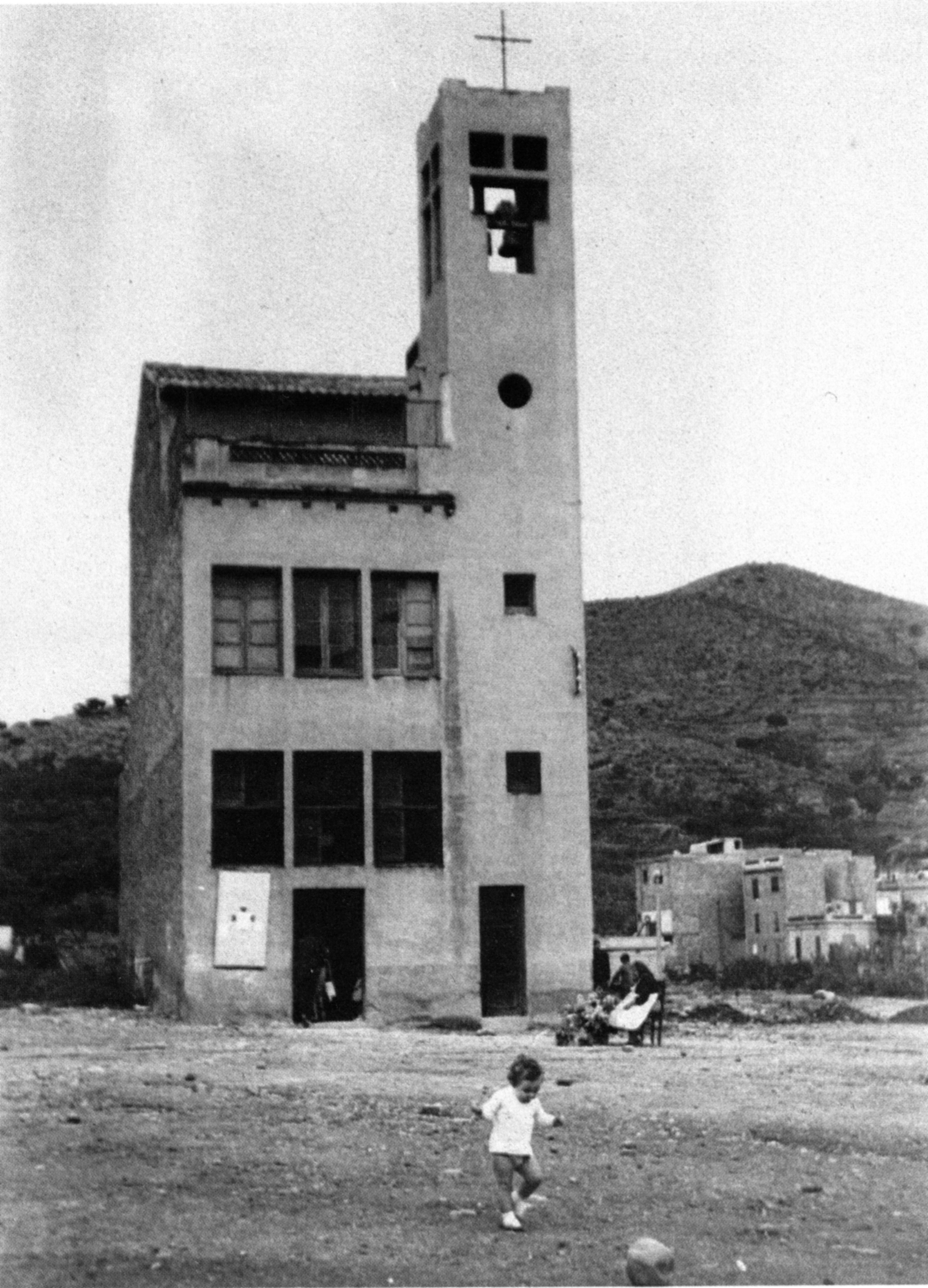 La parròquia de Sant Mateu, del barri barceloní de La Guineueta, a principis dels seixanta